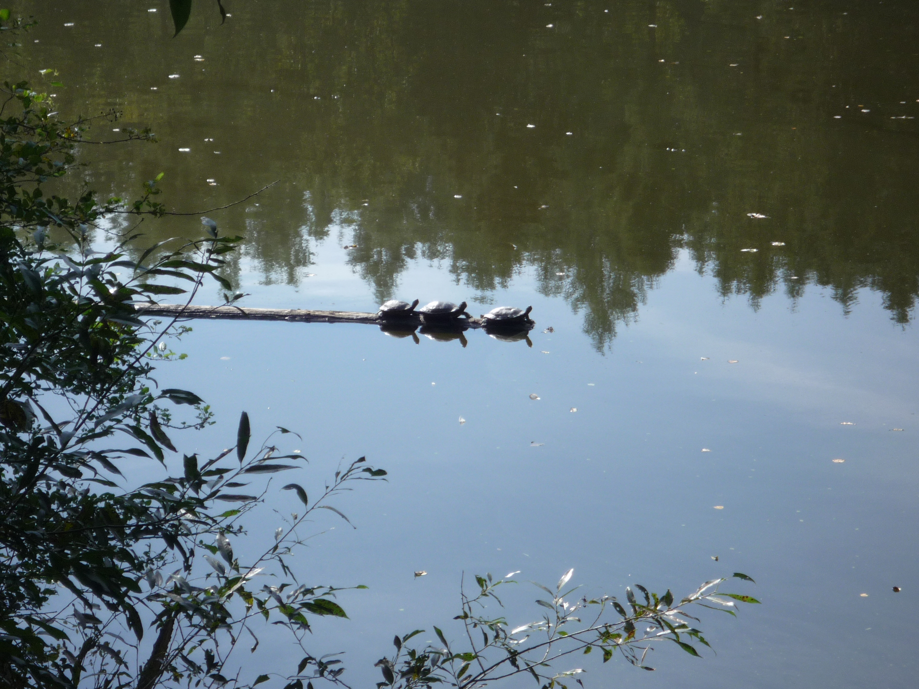 Schildkröten am Glashütter Weiher (St. Ingbert, Saarland, Deutschland)